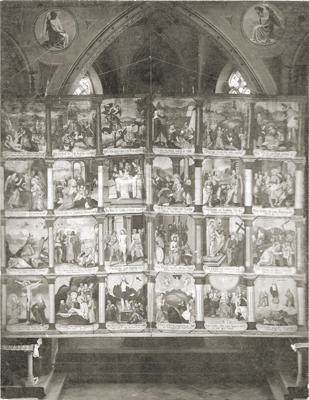 Benderer Fastentuch aus dem Jahr 1612, aufgehängt vor dem Chorbogen der Benderer Pfarrkirche, Liechtenstein